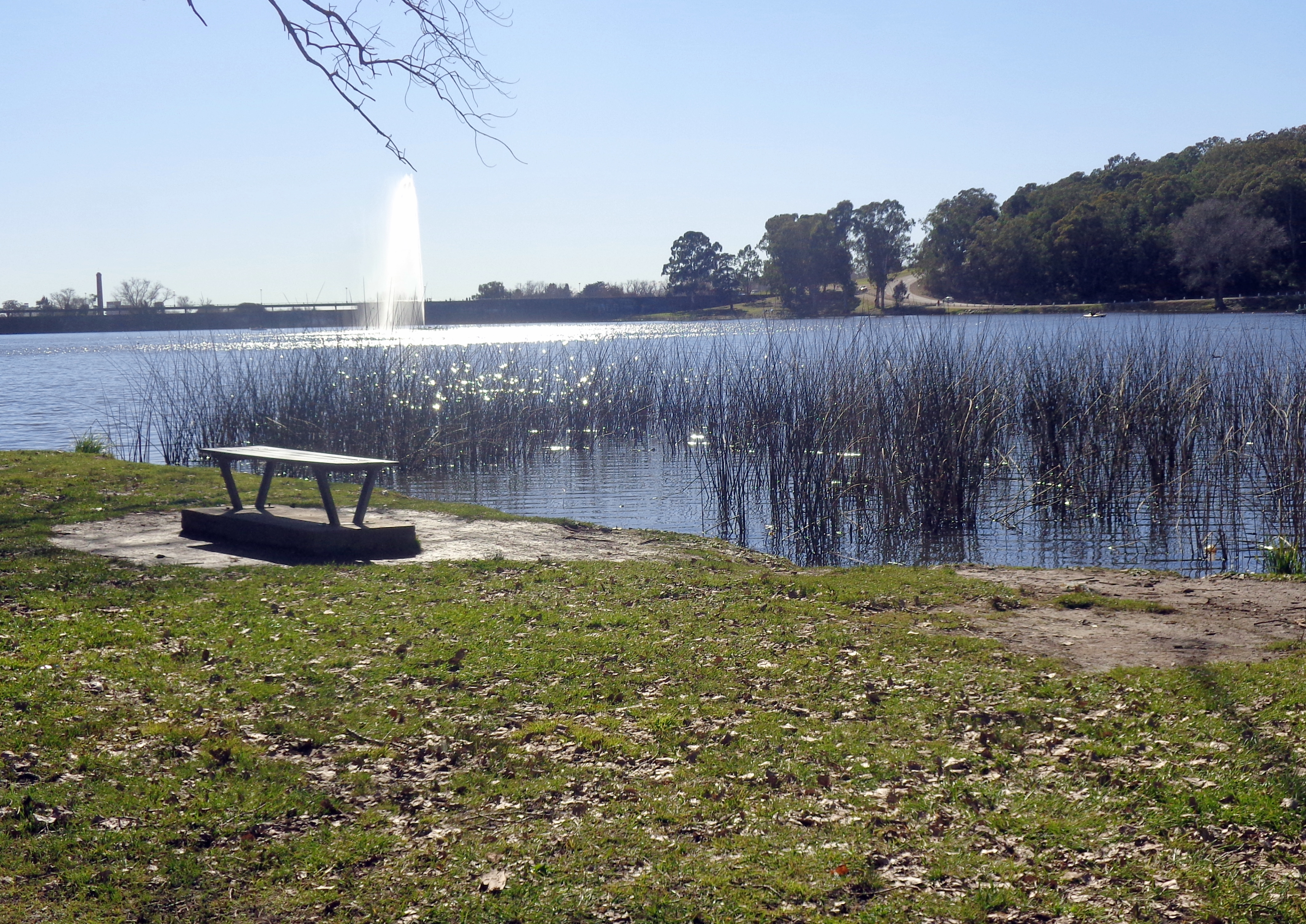 Lago del Fuerte, Tandil, Provincia de Buenos Aires, Argentina.